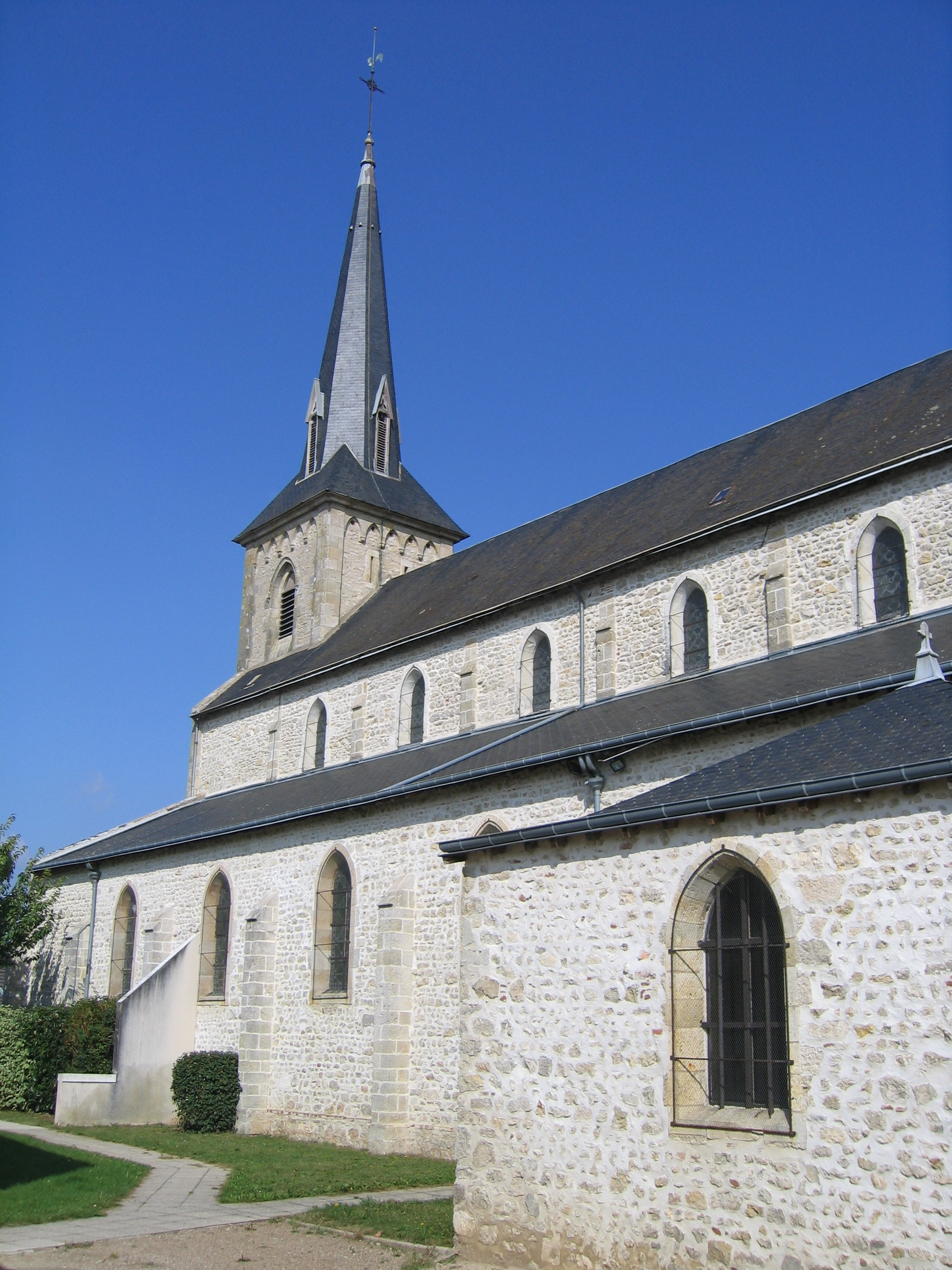 Église Saint-Pierre de Férolles, Loiret, Centre, France